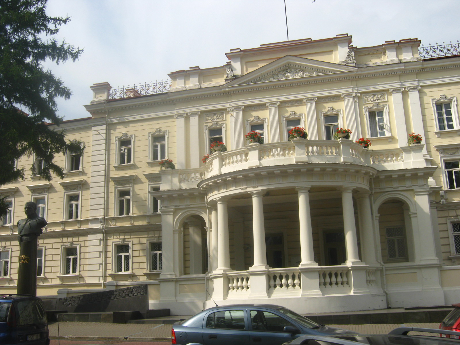 krašto apsaugos ministerija